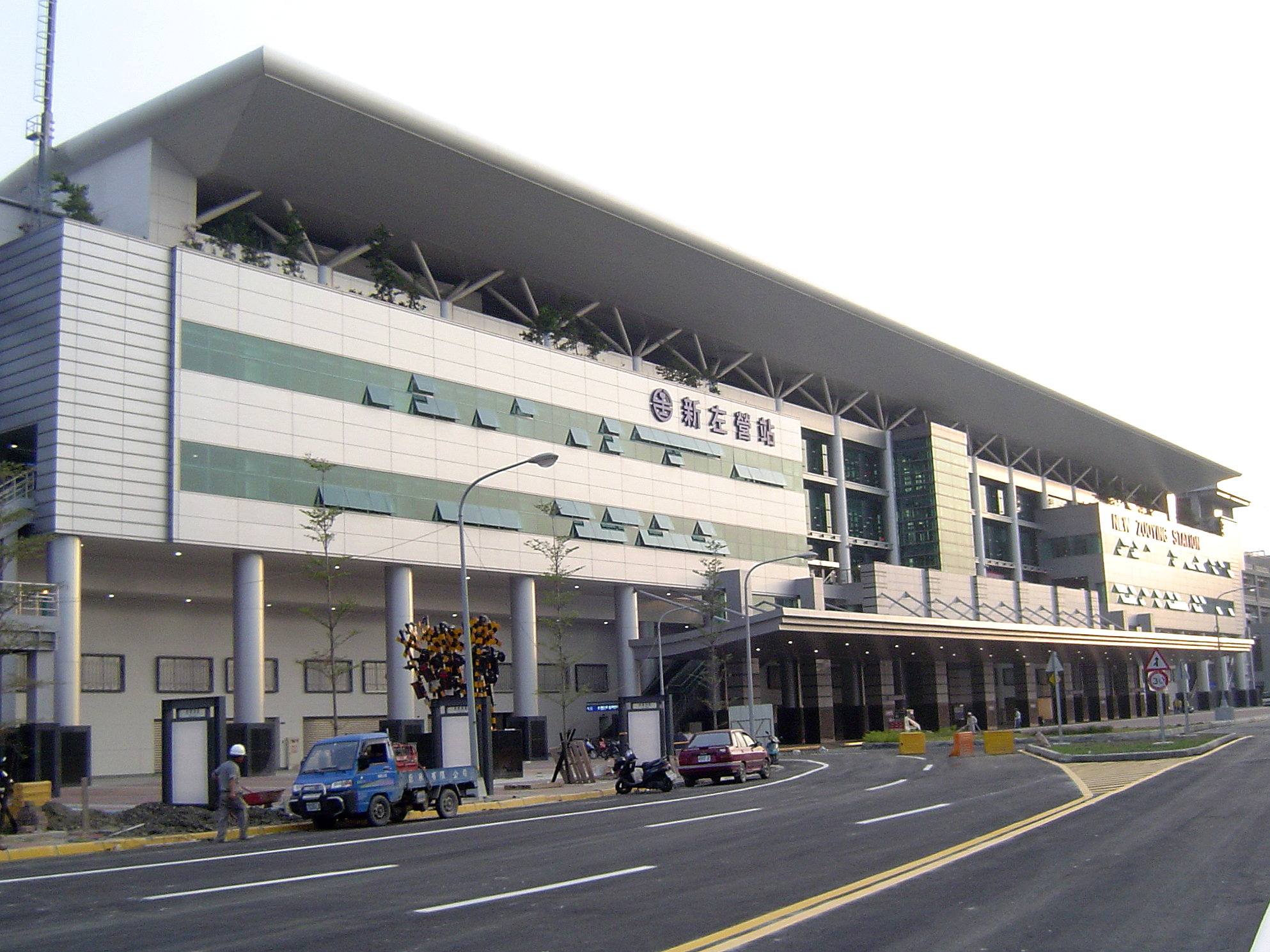 臺灣鐵路管理局新左營車站。